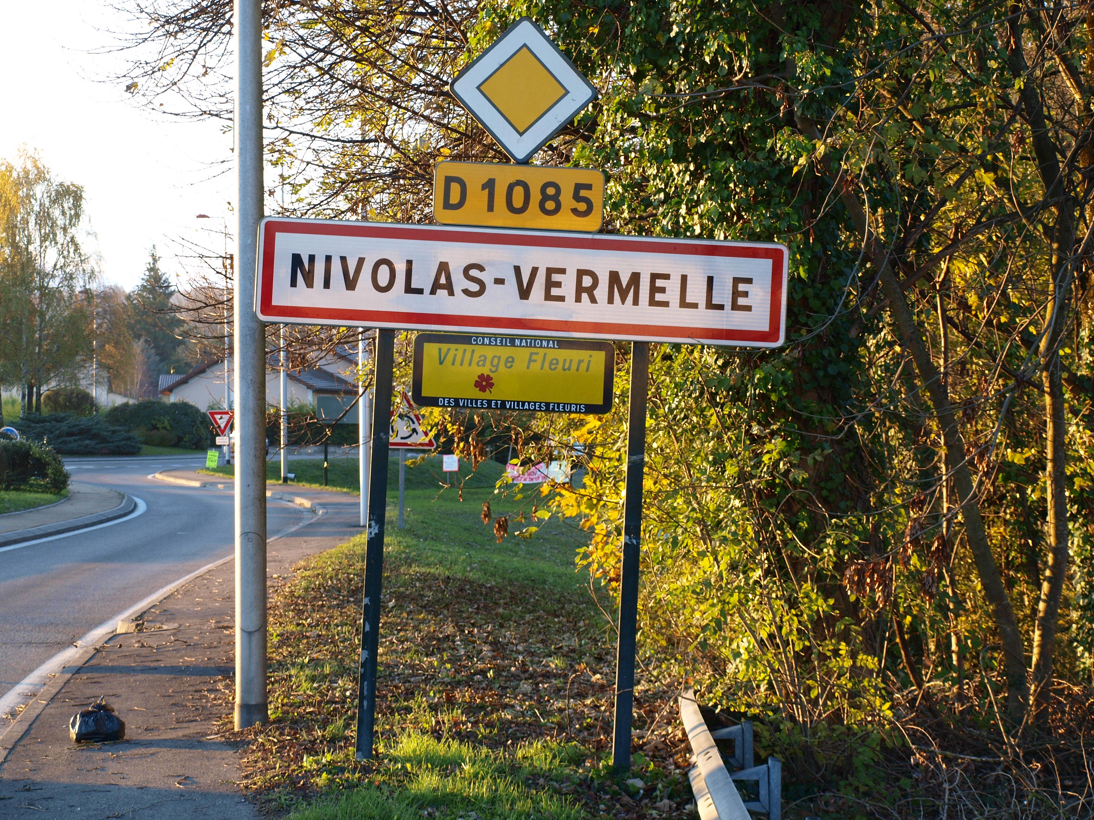 Nivolas-Vermelle (Isère, France) ; panneau d'agglomération